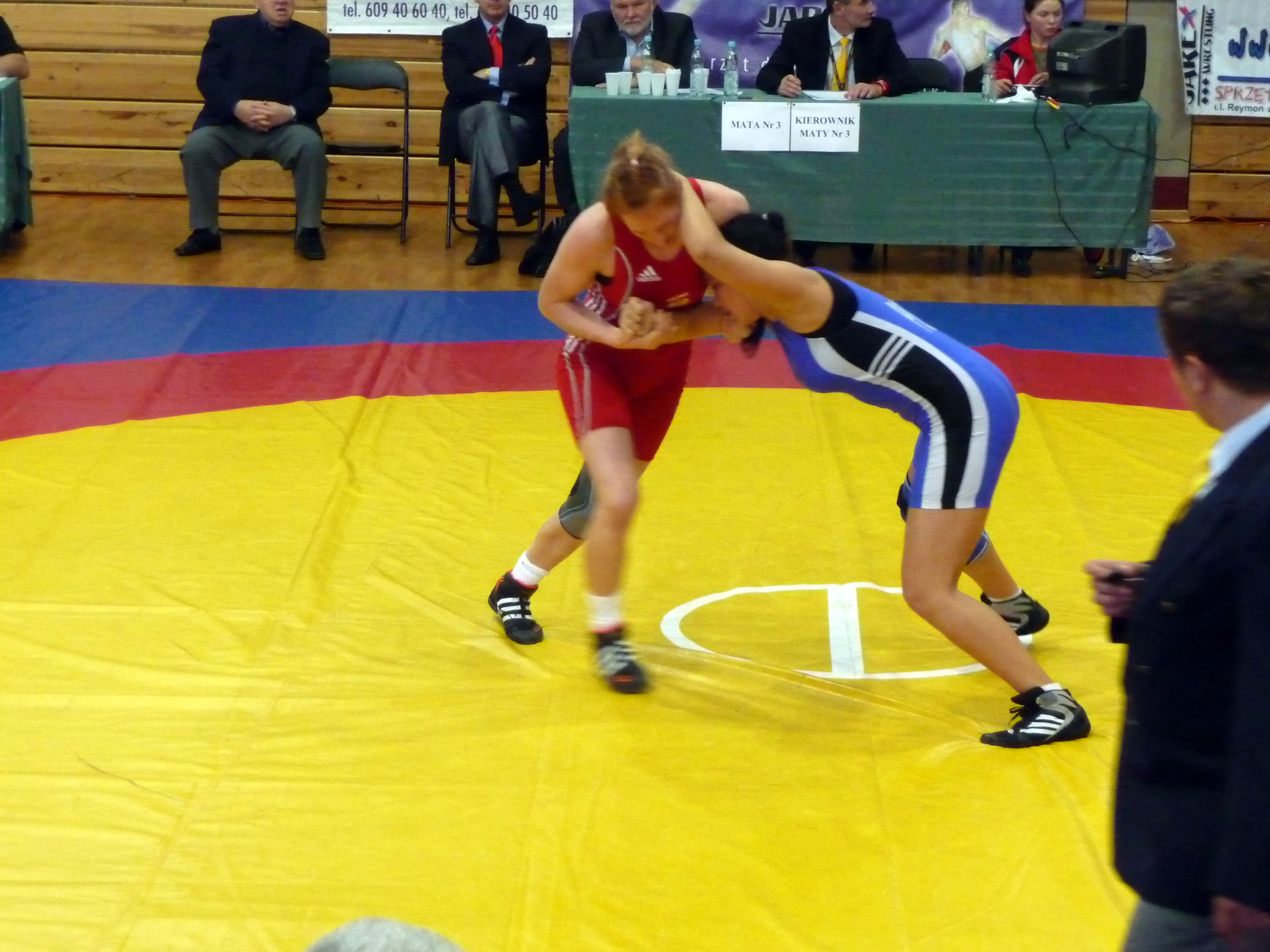 Mistrzostwa Polski 2009 Siedlce